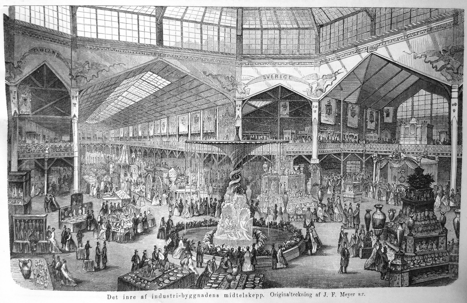 Illustration av interiören för Stockholmsutställningen 1866. "Öfversigten är tagen från vestra galleriet straxt söder om dubbeltrappan. På motsatta galleriet ser man till höger hr. Andersons orgel ofvanför hr. Langemeiers dekorerade rum. Dernere, på höra sidan om molinska fontänen, har man Rörstrands och Gustafsbergs porsliner, jemte hr. Svanbergs s. k. palm-trymå, och på den venstra Höganäs' stora urna, hr. Basks bundtmakeriarbeten (vaktade af pantern och de fyra damerna)"